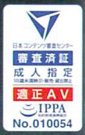 IPPA審査済証